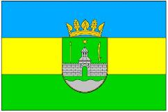 Прапор Староконстантинівського району